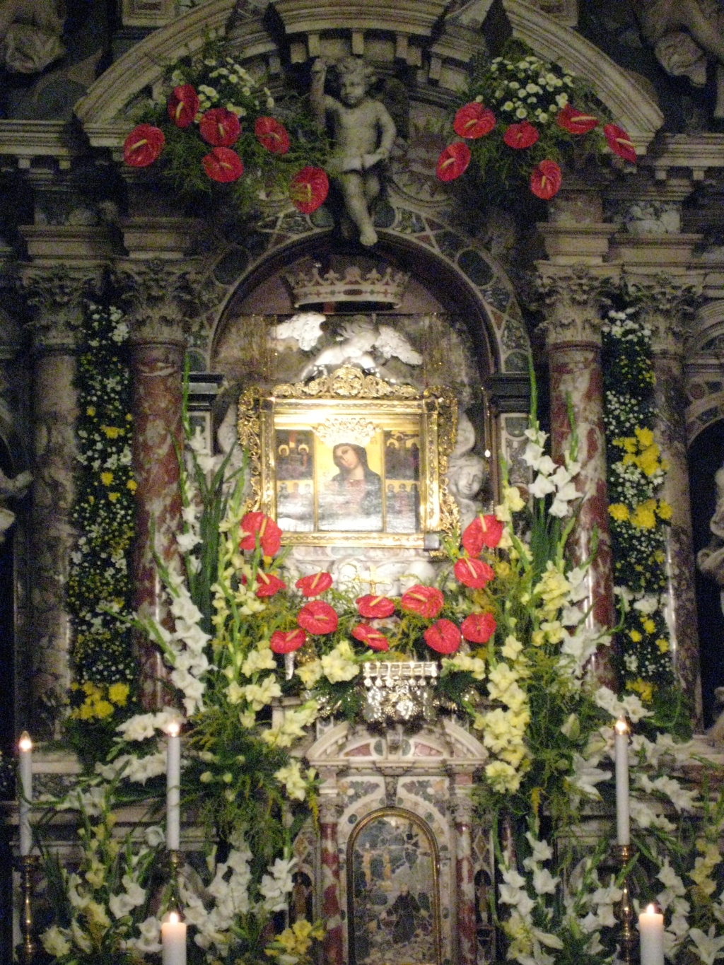 Slika Gospe Trsatske, Rijeka. Croatia